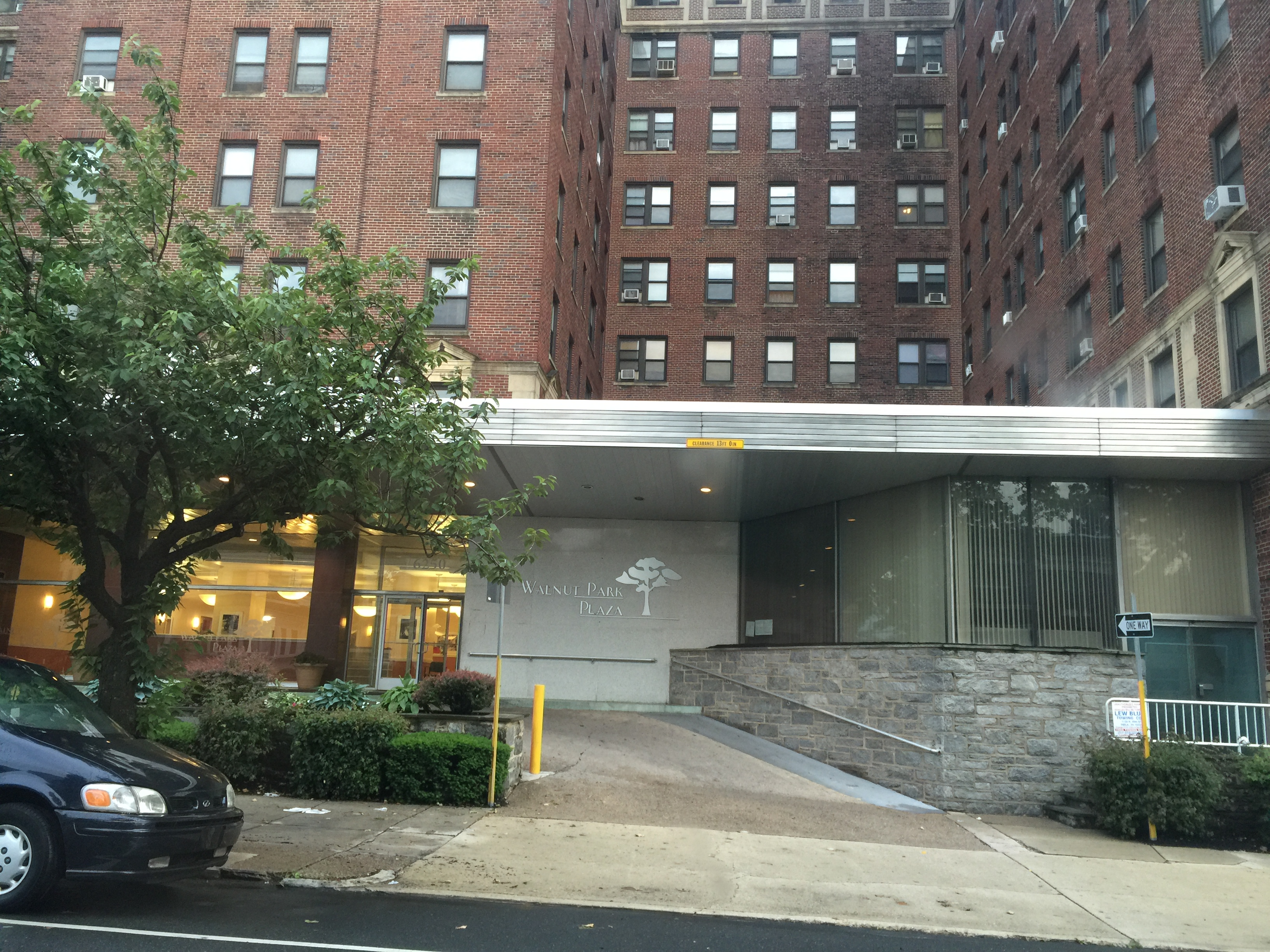 Walnut Hill Plaza